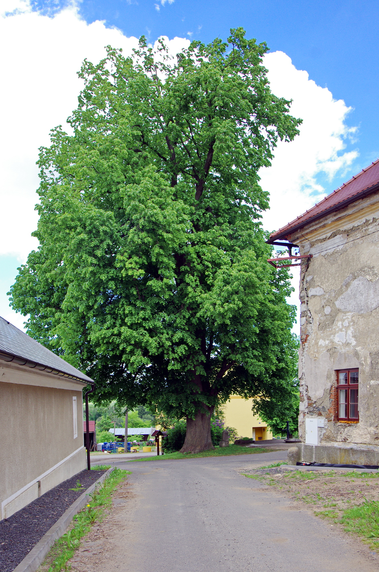 památný strom Lípa v Ovesných Kladrubech, okres Cheb